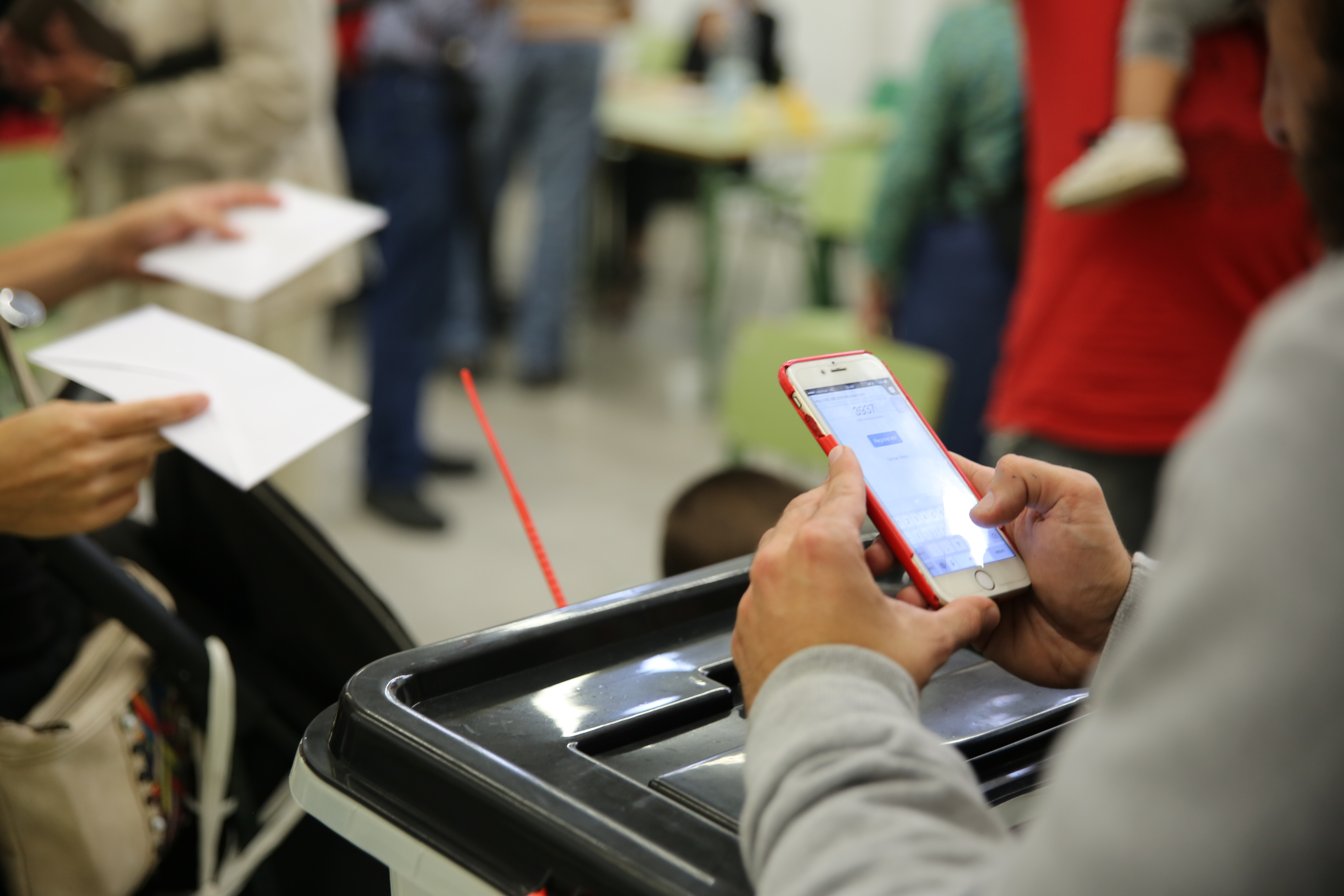 Referendum de independencia de Cataluña del 1 de octubre de 2017 Wikipedia: Catalan independence referendum, 2017 See alsocategory: Catalan independence referendum, 2017.